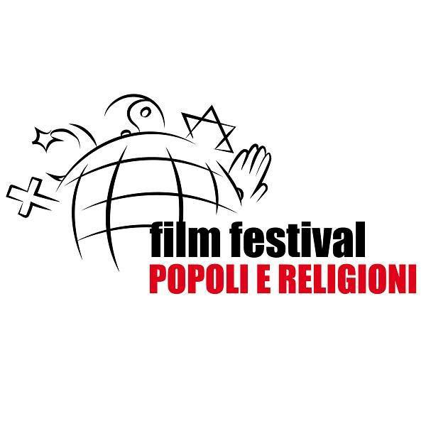 Logo Popoli e Religioni - Terni Film Festival